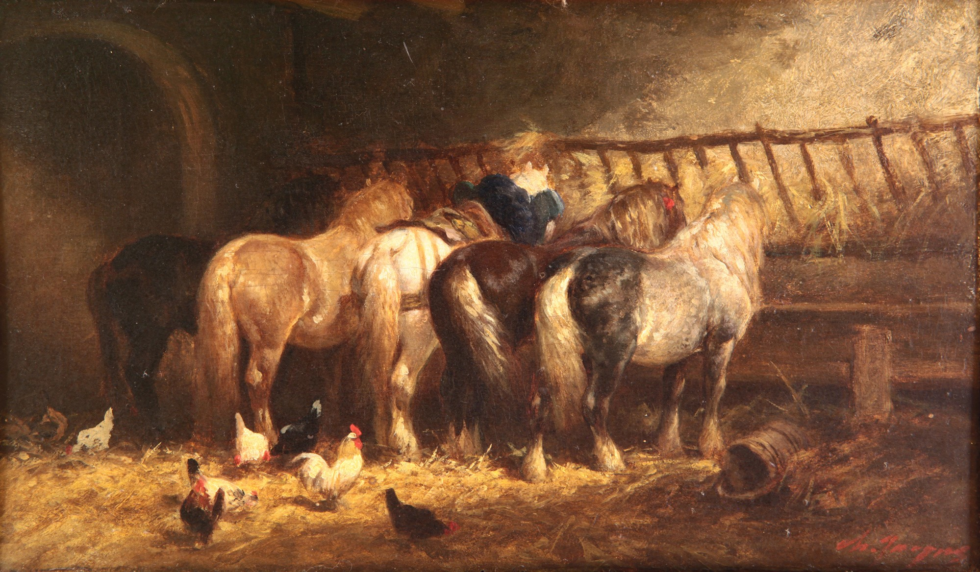 Charles Jacque, Ecurie (El Establo). Siglo XIX. 13,3 x 21,5 cm, con marco: 36,5 x 41,5 x 8,5 x 12,5 cm, óleo sobre tabla. Inv. 2749.